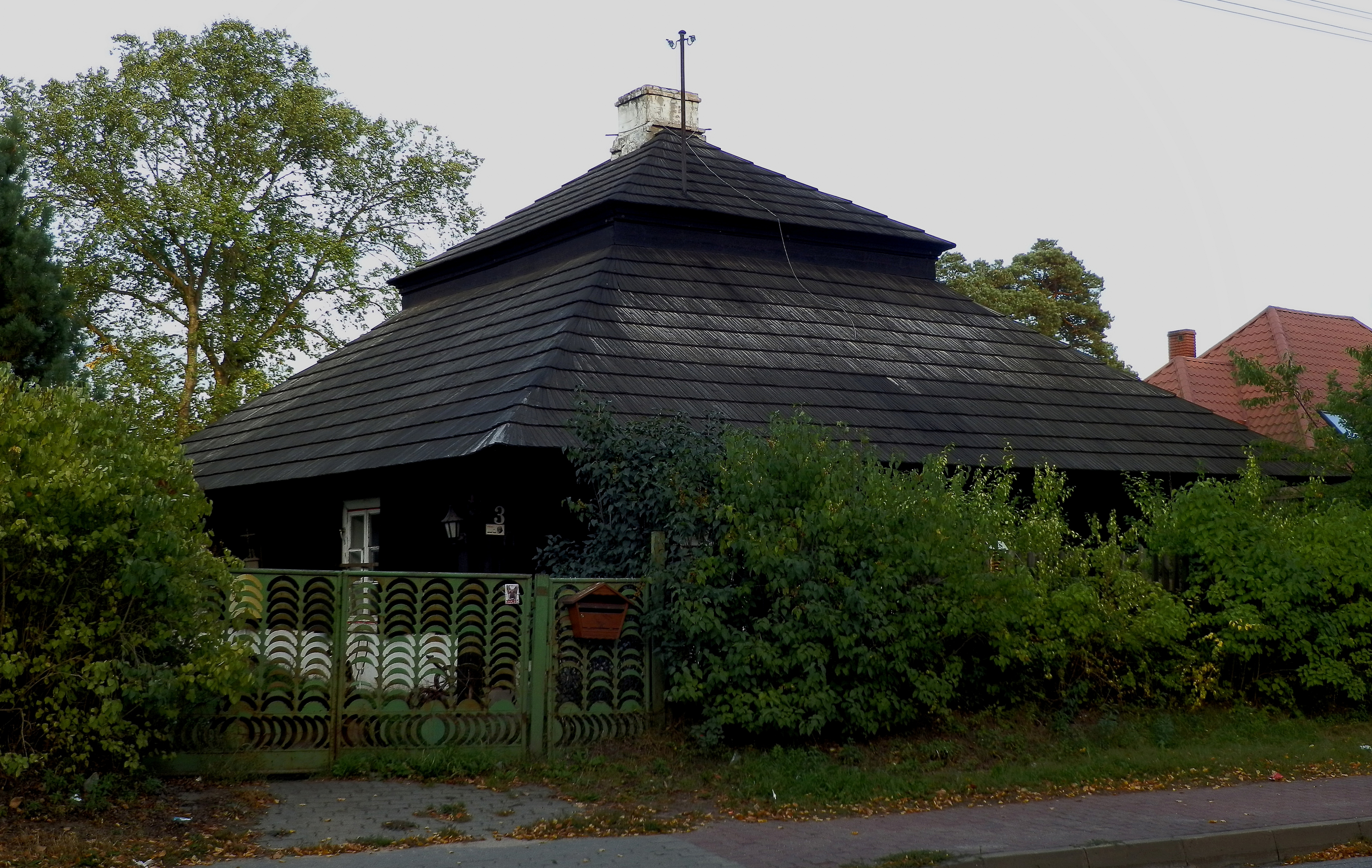 Dworek tzw. Kałamarzyk z XIX wieku. 01.1957.